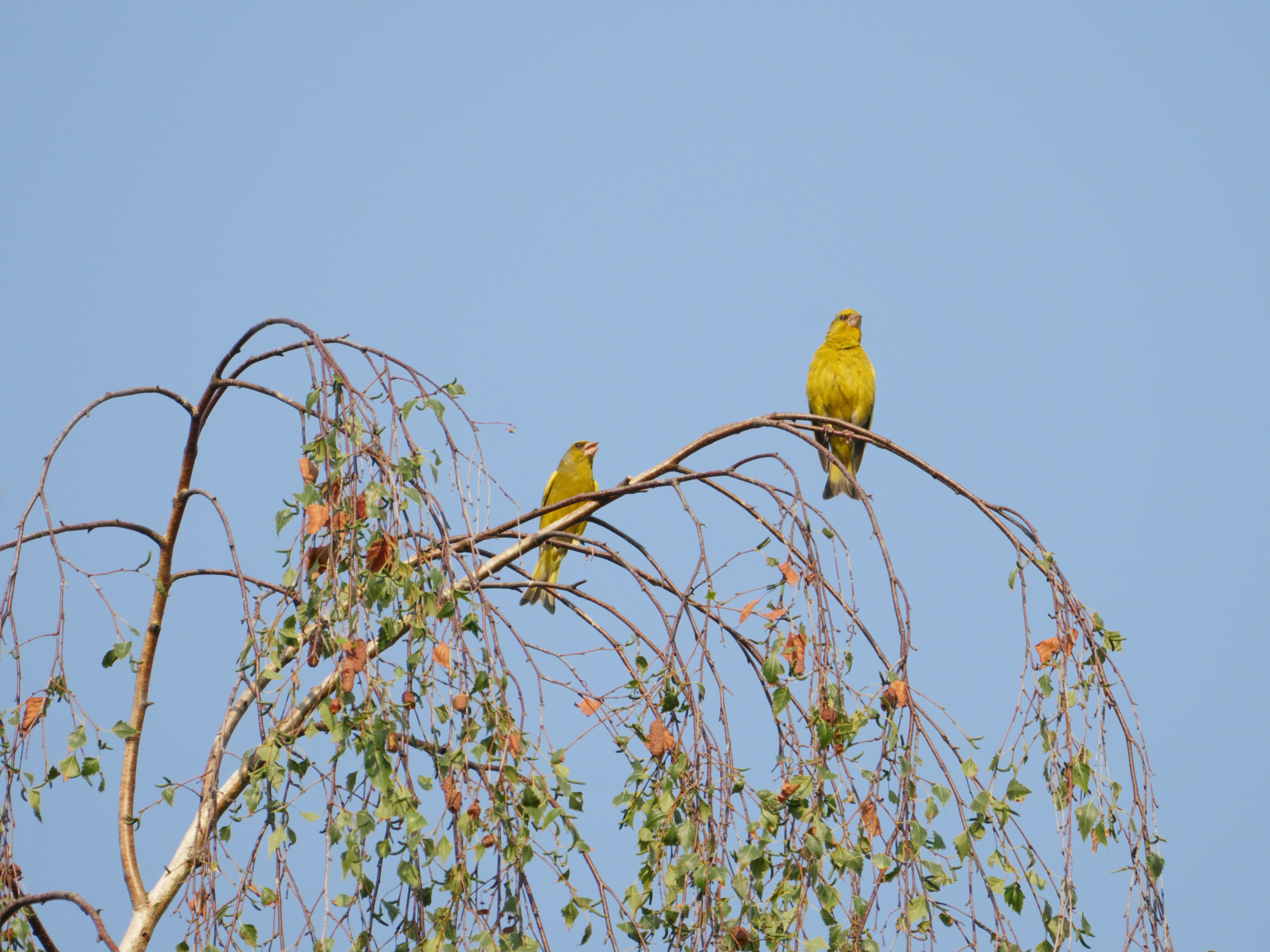 Europäisches Vogelschutzgebiet Müggelspree in Berlin / Deutschland Zwei Grünfinken, Männchen